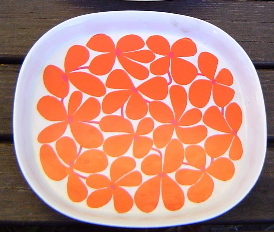 Eg, Jorunn, har teke biletet sjølv. Plasttallerken (Plasttype: Ornamin), design:Stig Lindberg, namn på dekor: Balett, produsent: Gustavsberg, Sverige.